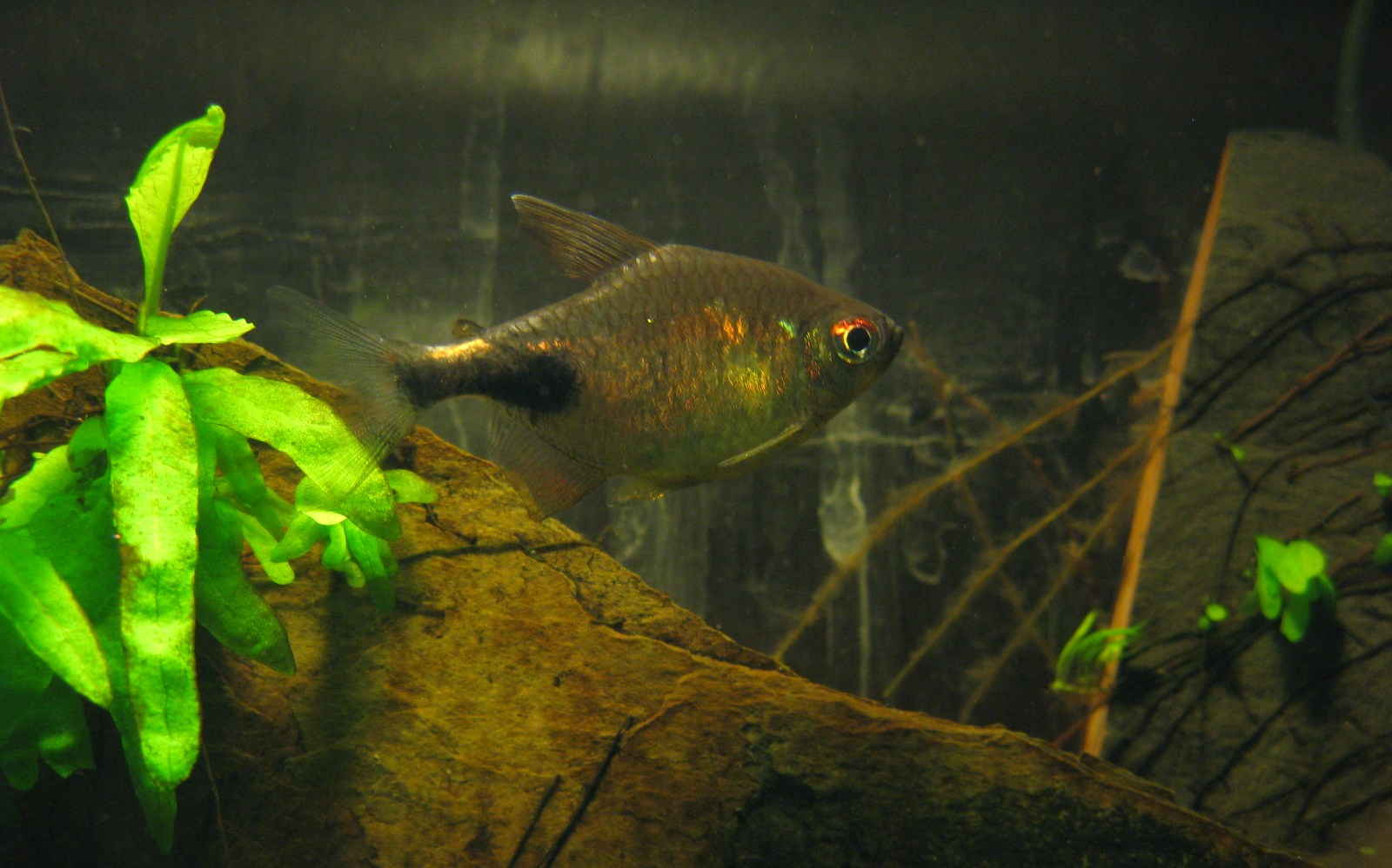 Hemigrammus pulcher